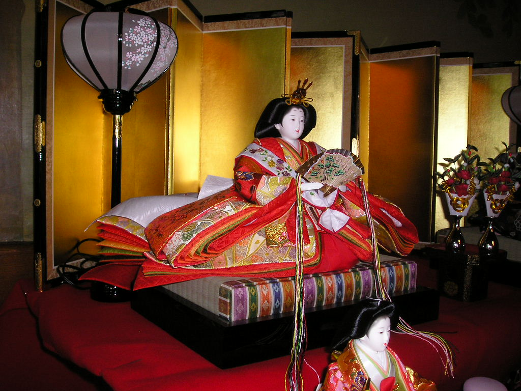 Ohina Matsuri